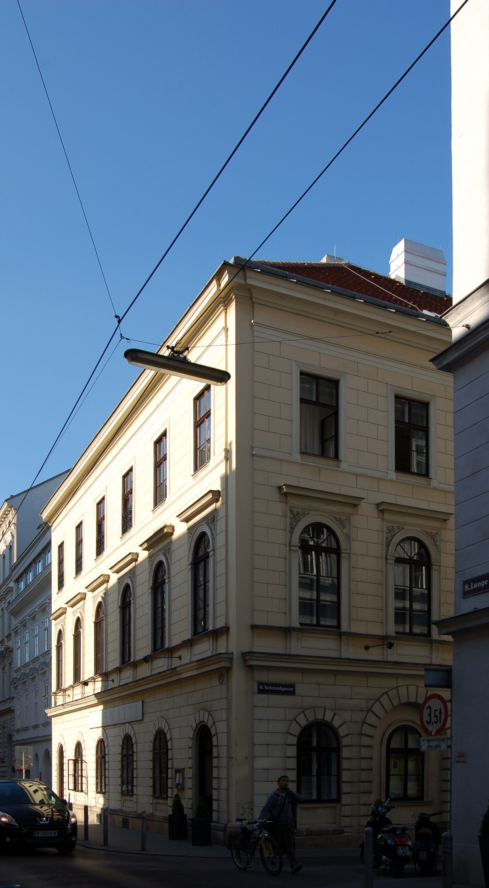 Das denkmalgeschützte Gebäude in der Schmidgasse 18 in Wien-Josefstadt.